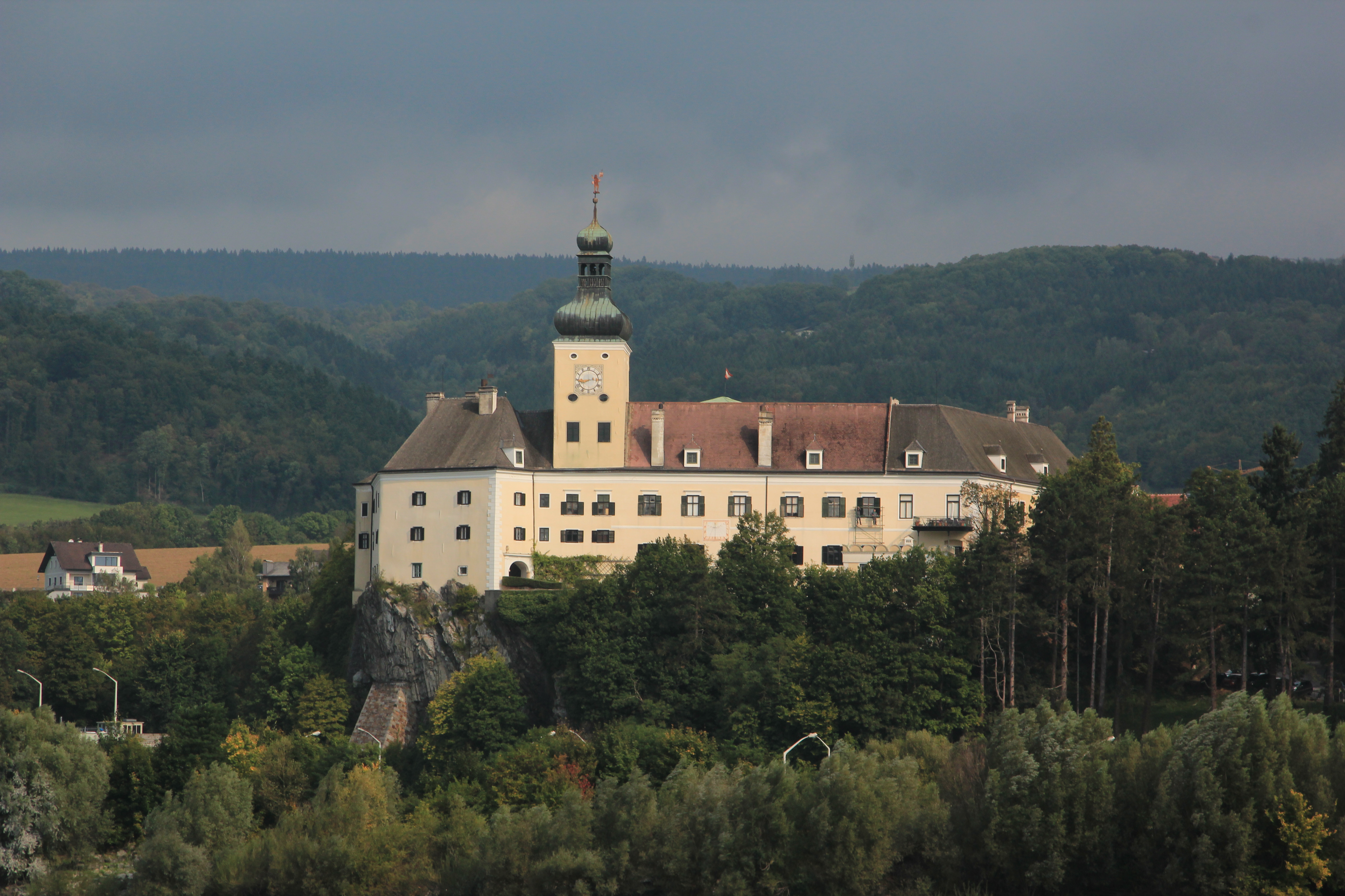 Schloss Persenbeug